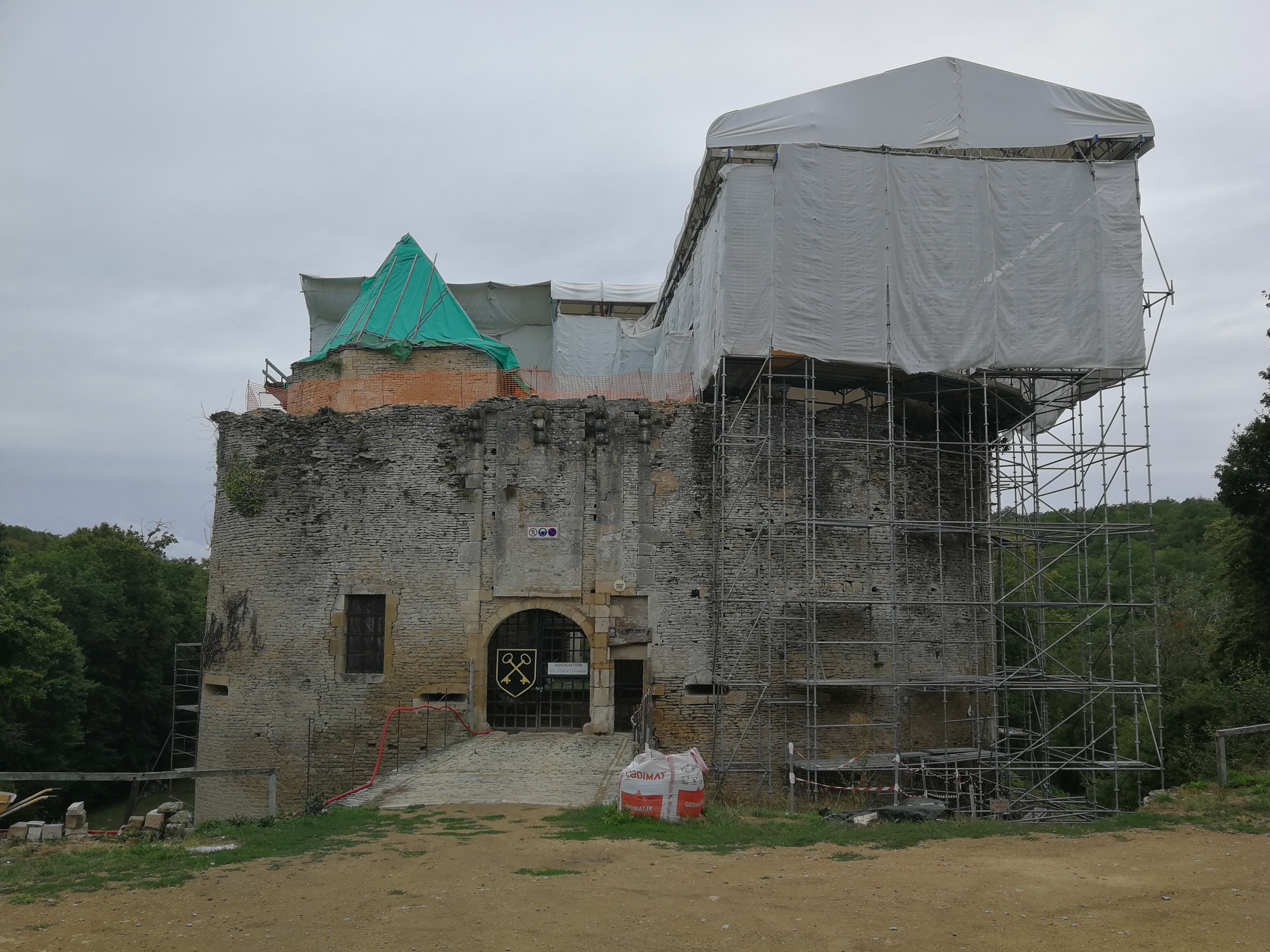 Überdachung des Tiergebäudes, um weiteren Verfall zu verhindern.